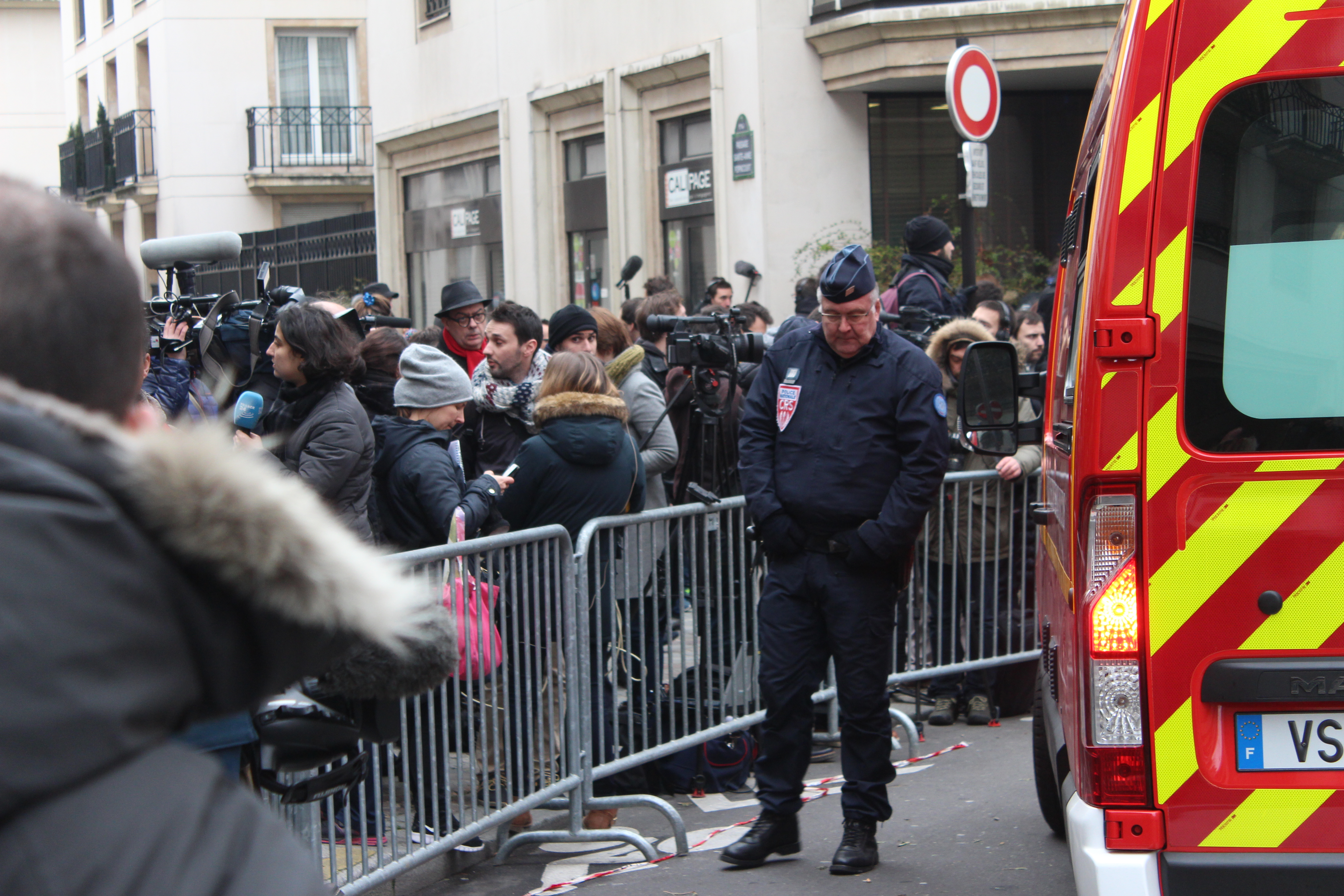 Vue de la zone du 11e arrondissement interdite aux badauds par la police après la fusillade au siège de Charlie Hebdo, prise avec l'aide du journaliste de LCP Jérémie Hartmann.